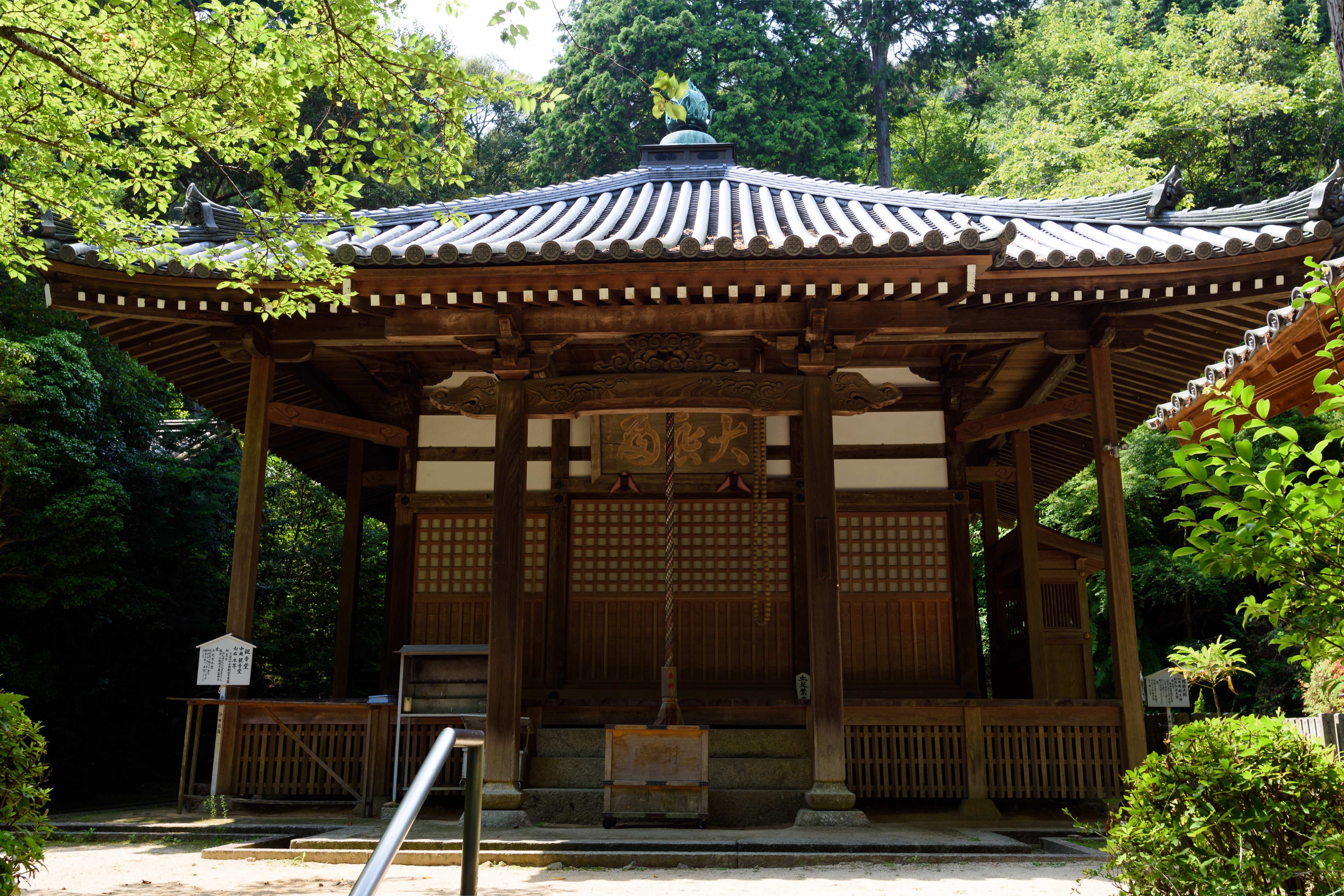 元山上千光寺の観音堂